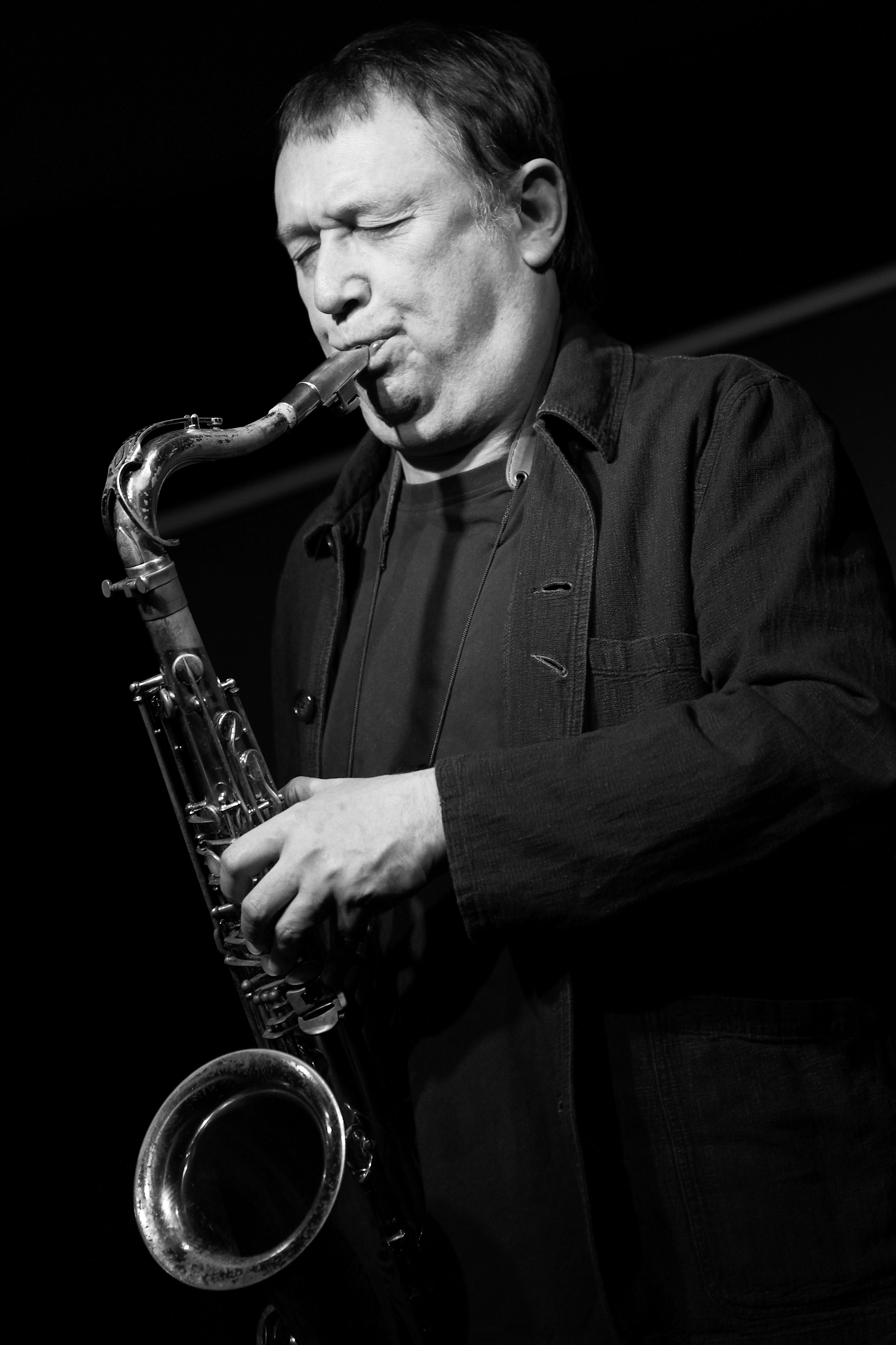 Das Trio mit John Butcher (sax), Wilbert de Joode (db) und Martin Blume (dr) im Club W71, 2018. Eine Veranstaltung in Zusammenarbeit des Club W71 mit dem SWR2 und Julia Neupert.